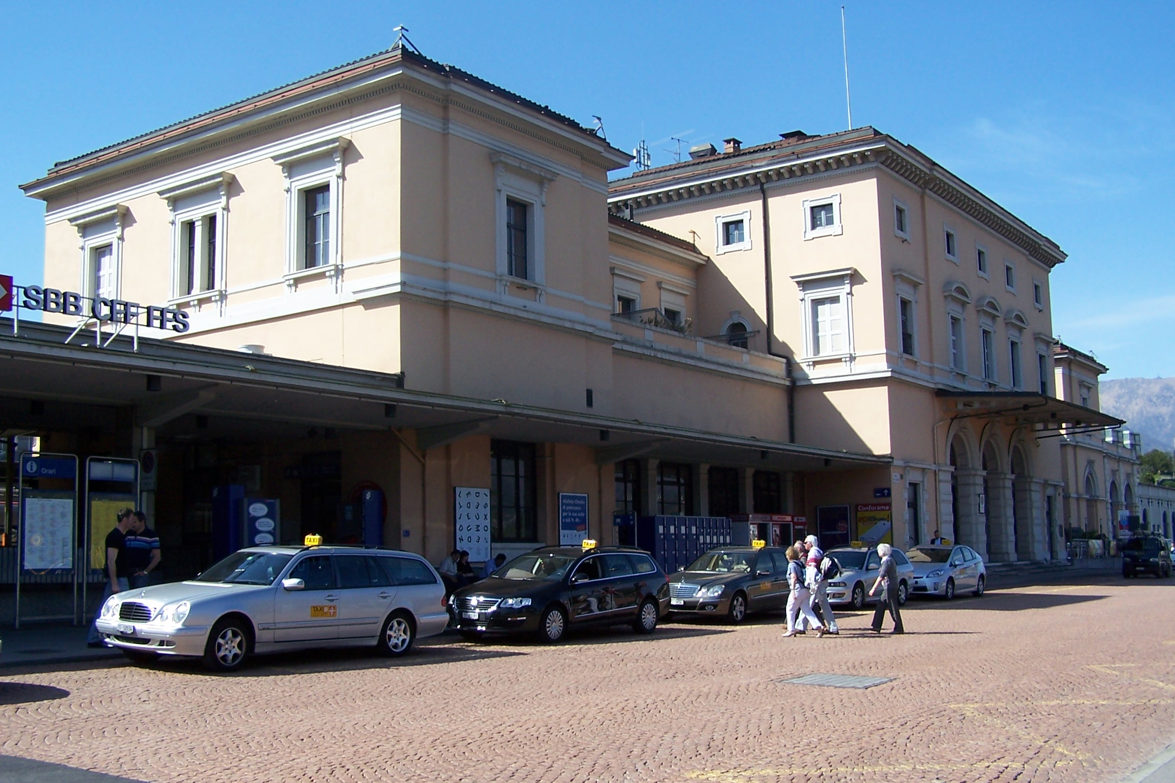 Fassadenansicht des Bahnhofsgebäudes von Lugano